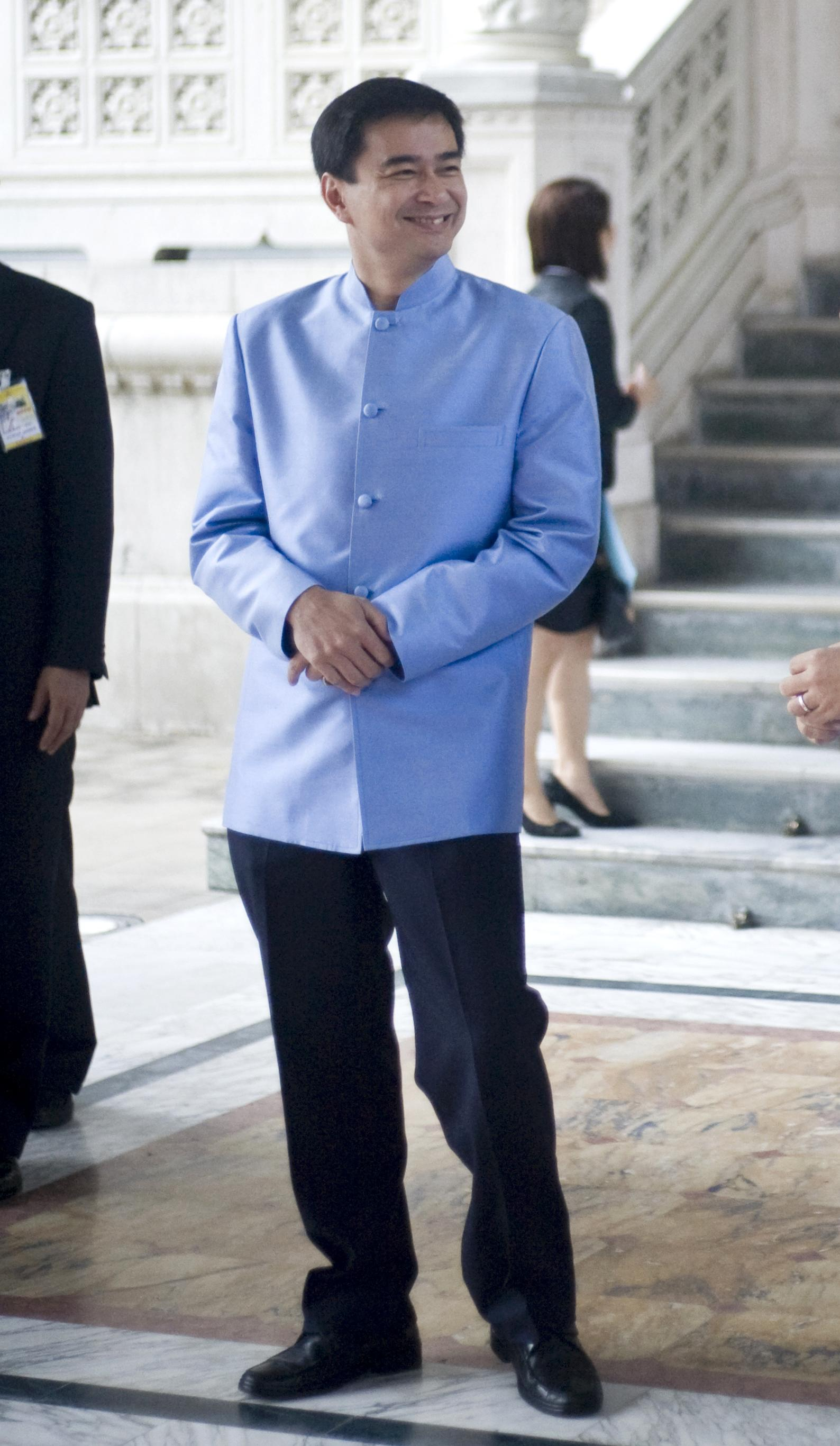 นายกรัฐมนตรีและคณะ ร่วมพิธีเจริญพระพุทธมนต์ถวายเป็นพระราชกุศลแด่พระบาทสมเด็จพระเจ้าอยู่หัว และร่วมถวายภัตตาหารเพลแด่พระสงฆ์ที่มาร่วมงานในพิธี ณ ตึกสันติไมตรี ทำเนียบรัฐบาล 2ตุลาคม2552 (The Official Site of The Prime Minister of Thailand Photo by พีรพัฒน์ วิมลรังครัตน์)